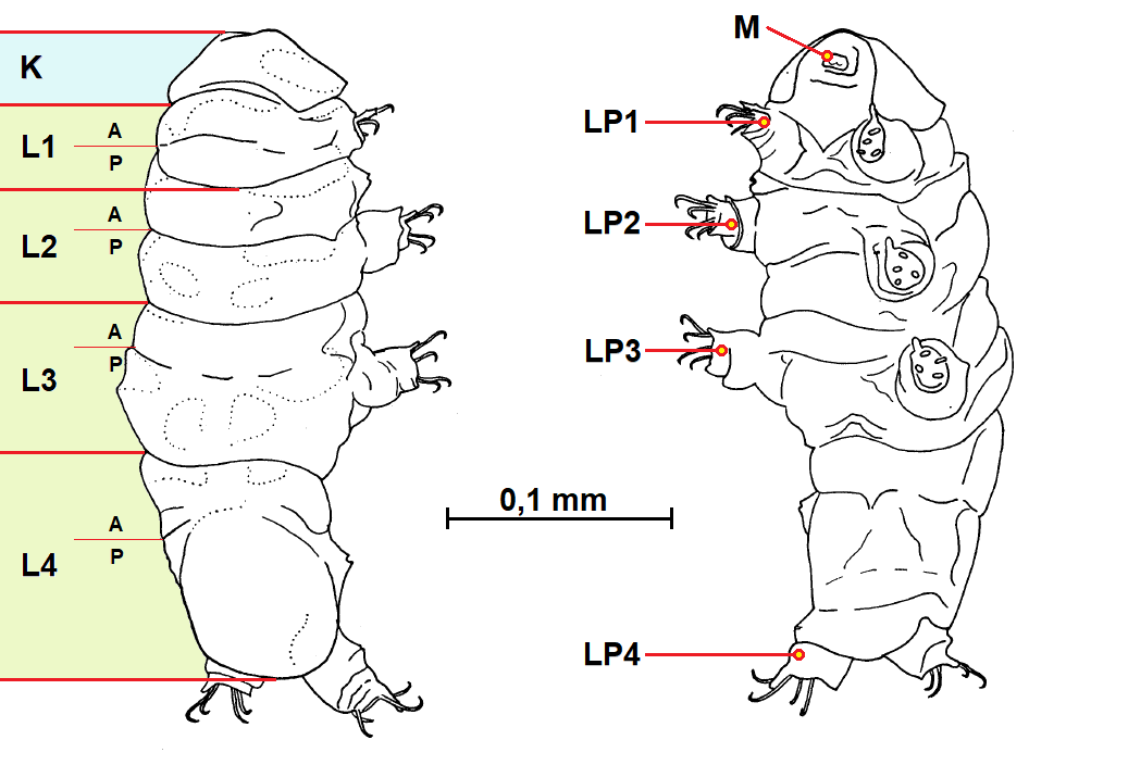 Based on File:Beorn_leggi_drawings.png